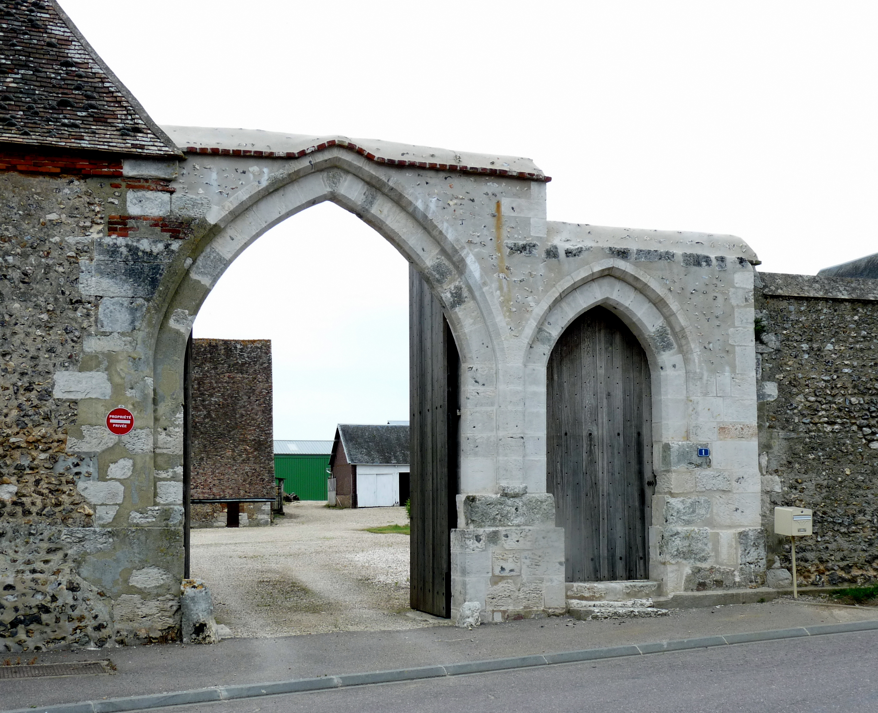 Ferme de Guiseniers